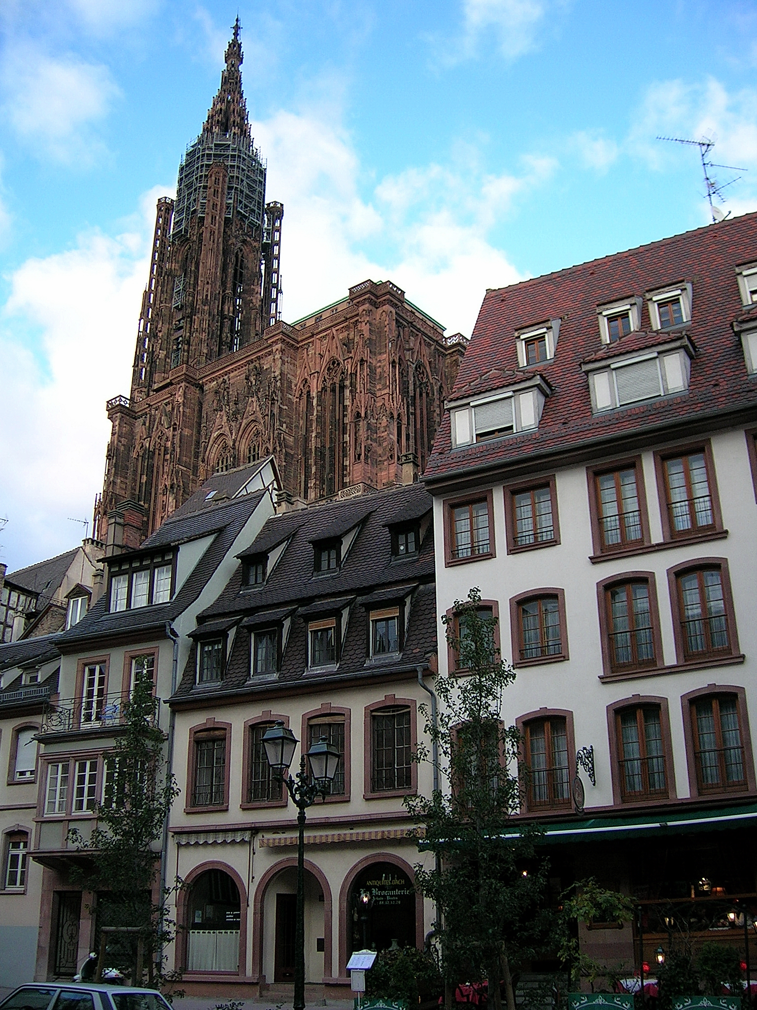 Turm und Schiff des Strasburger Münsters über der Altstadt